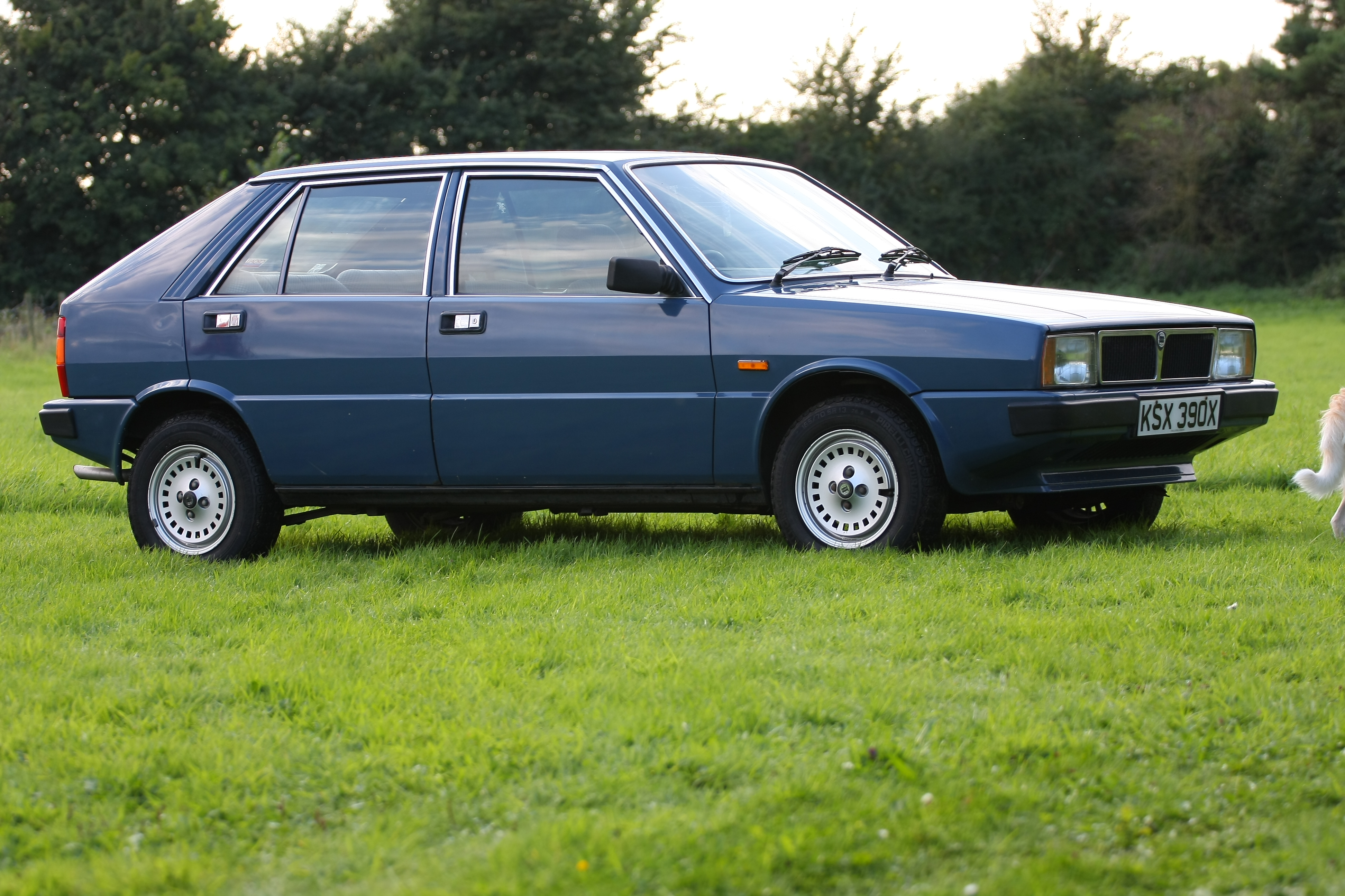 1982 Lancia Delta 1500.